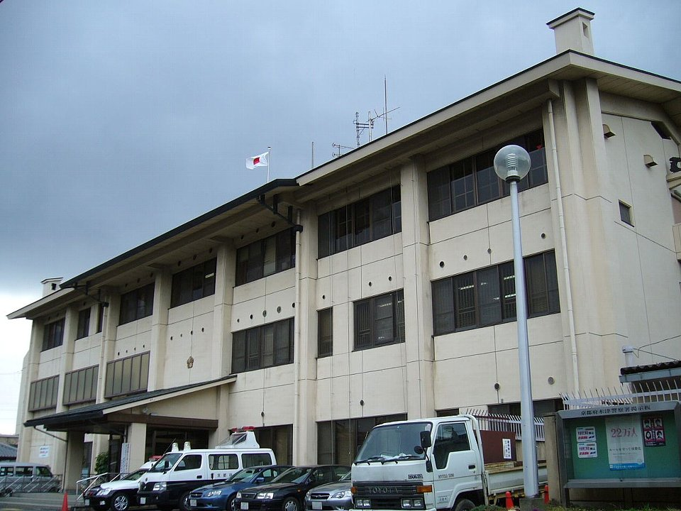 木津警察署